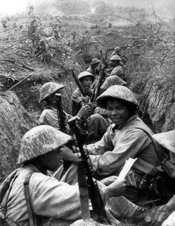 Combattenti vietminh nel periodo della battaglia di Dien Bien Phu